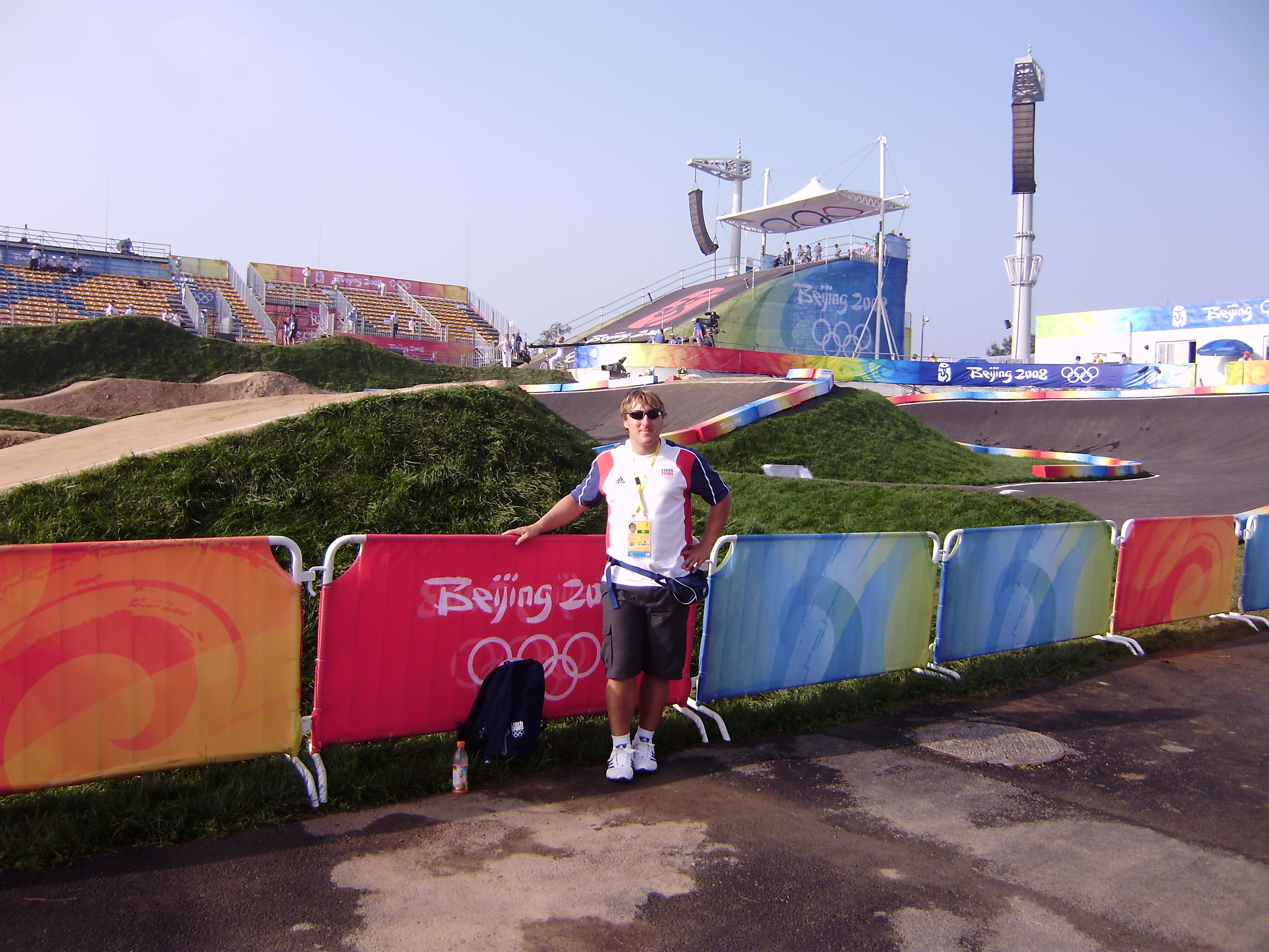 OH Peking 2008